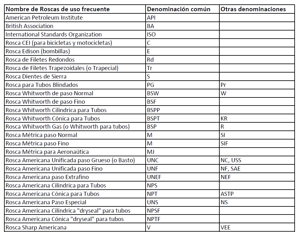 Cuadro resumen con algunos de los múltiples tipos de roscas existentes.